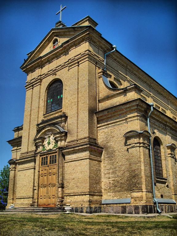 Vaidotų Šv. apaštalo Pauliaus Atsivertimo bažnyčia